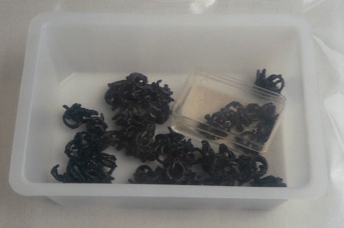 Teile eines Kettenhemds, gefunden bei der Ausgrabung der Siedlungskammer Rullstorf, Foto aufgenommen bei der Ausstellung "Pferd und Sachsen bei den Altsachsen" im Kloster Ebstorf, schlechte Bildqualität, da Fundstück in Plastikfolie unter Schutzgas verpackt.